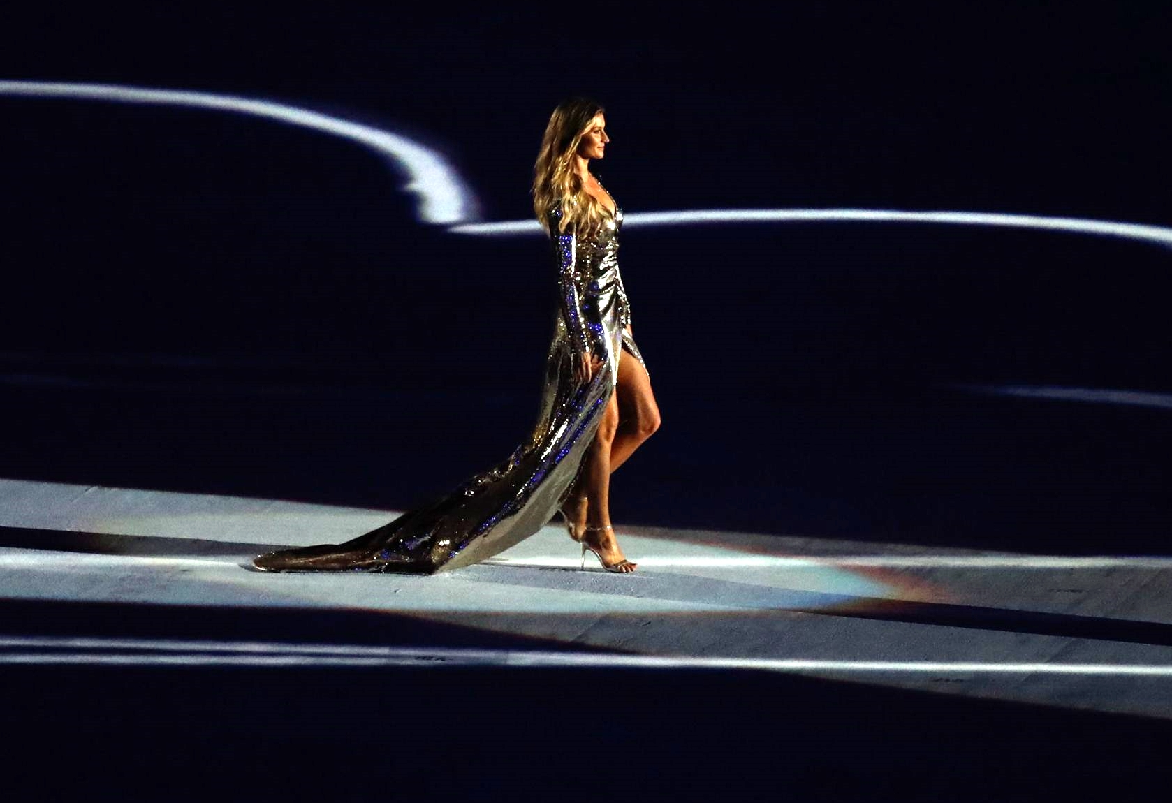 Gisele Bündchen desfila em passarela de 128 metros na abertura dos Jogos Olímpicos Rio 2016.